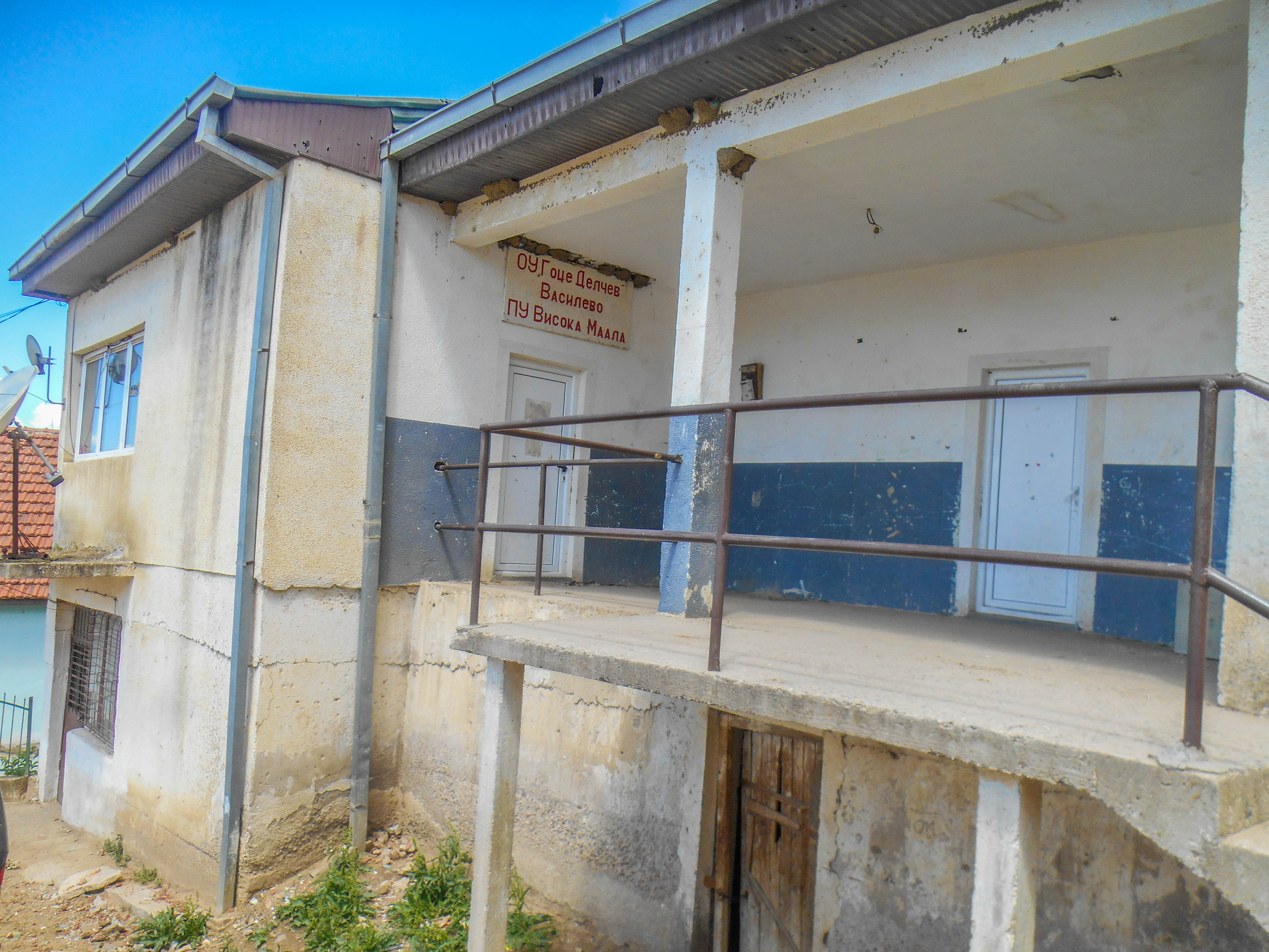 Основно училиште „Атанас Нивичански“ - Висока Маала